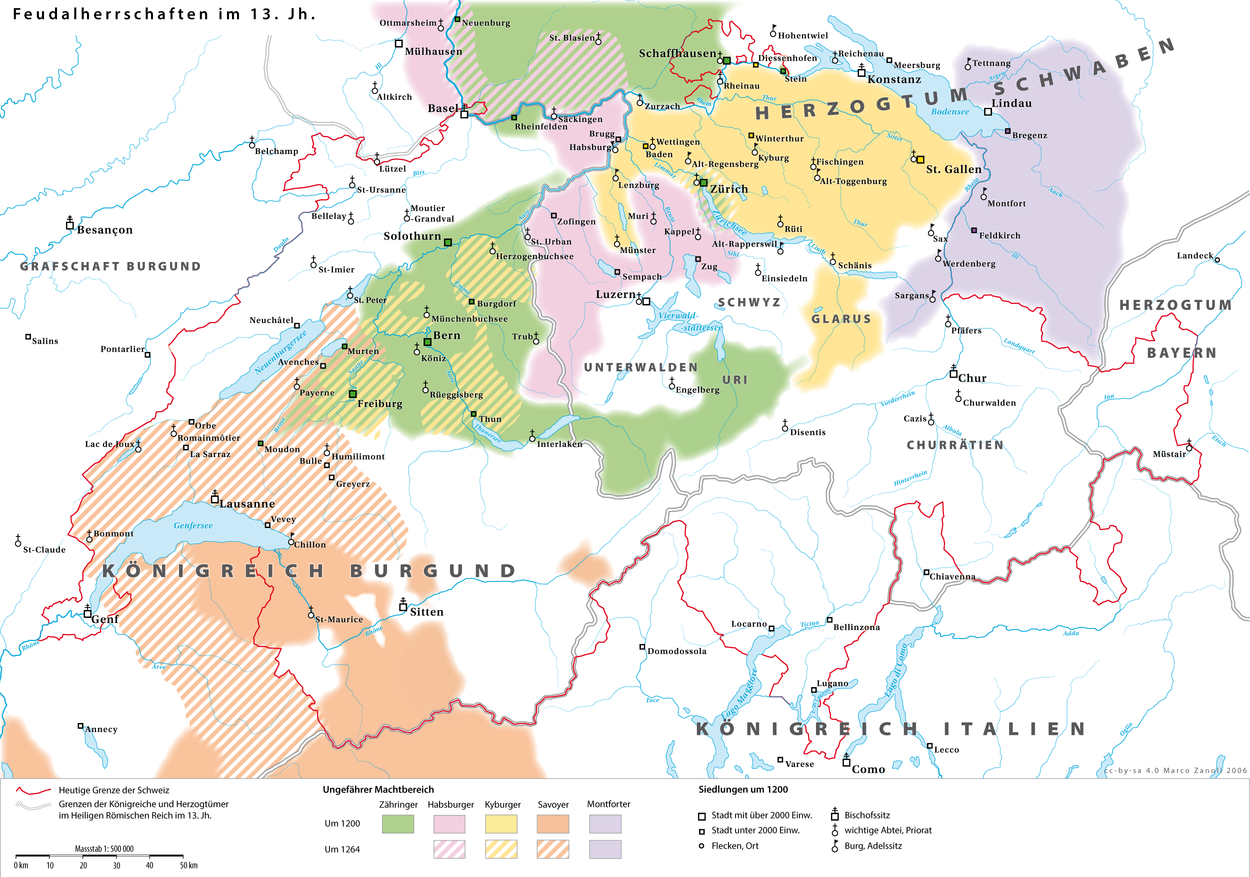 Die Schweiz um 1200. Feudalherrschaften, Kirche und Verkehrsverbindungen. Die Grenzen der Gebiete geben nur den ungefähren Machtbereich der Adelsgeschlechter wieder